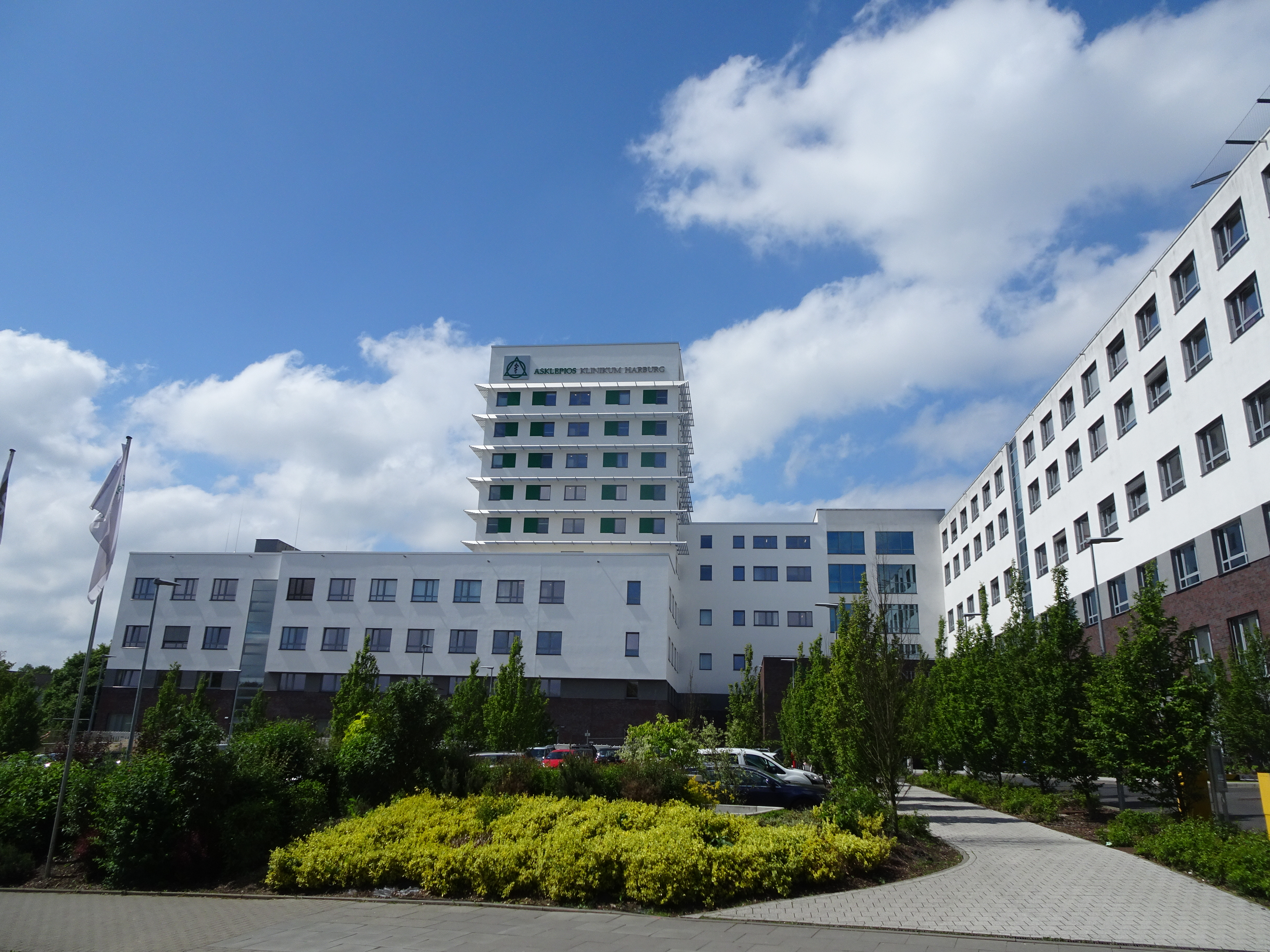 Asklepios Klinikum in Hamburg-Harburg